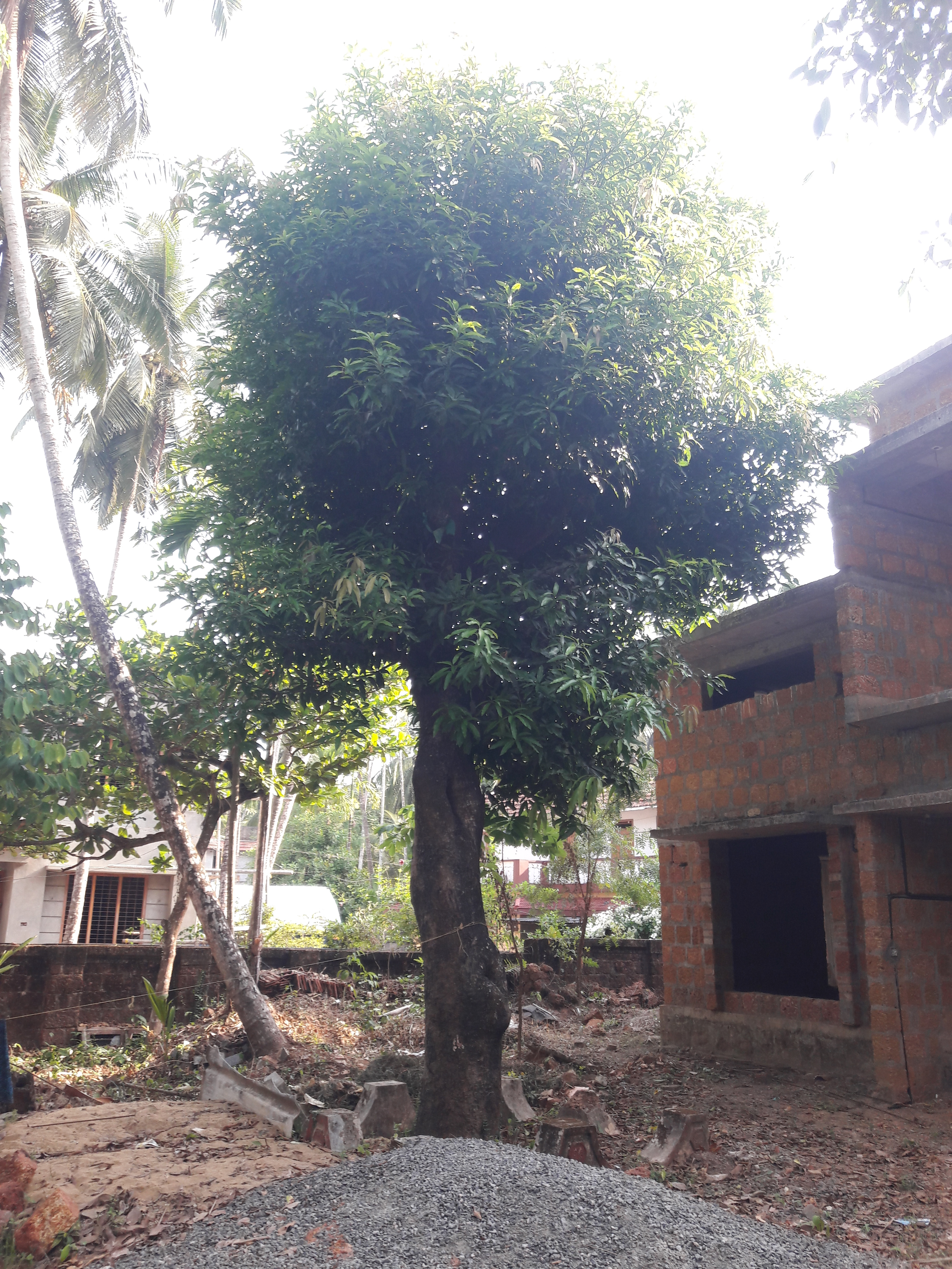 മരങ്ങളിലെ പുനർ യൗവന പ്രക്രിയ ചെയ്ത ശേഷം ഇലകള്‍ വരുന്ന മാവ്.